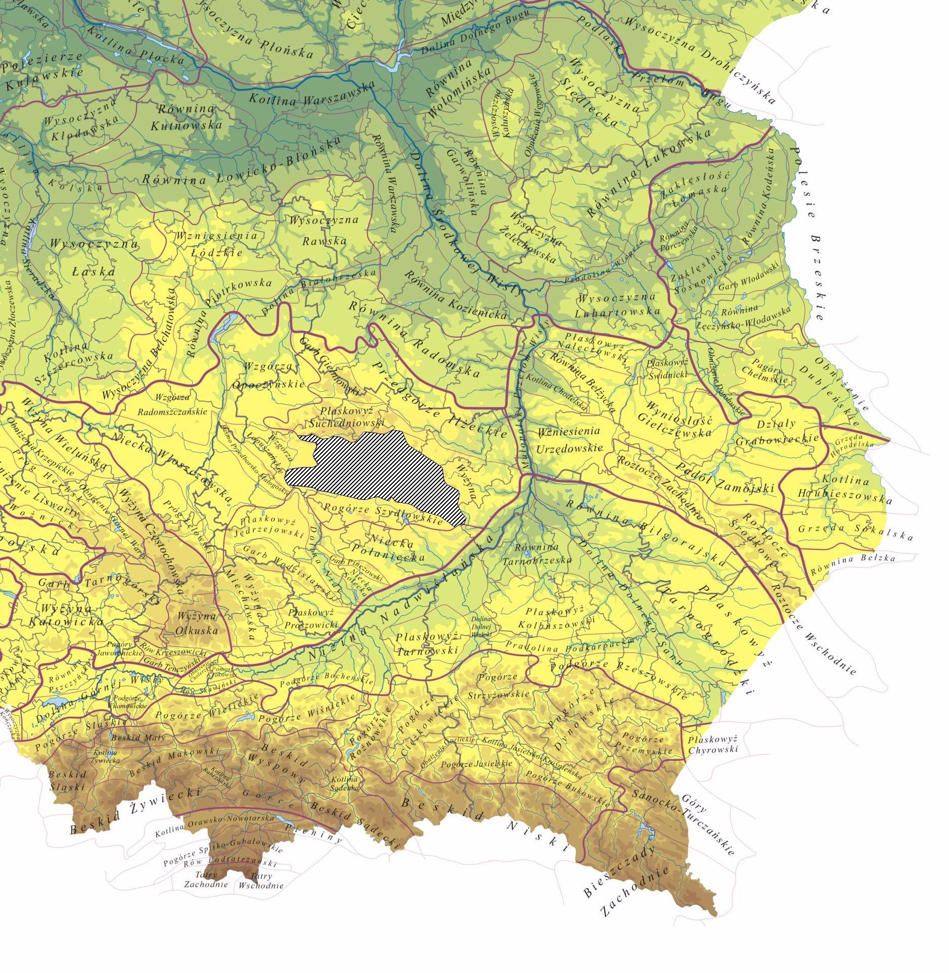 Góry Świętokrzyskie